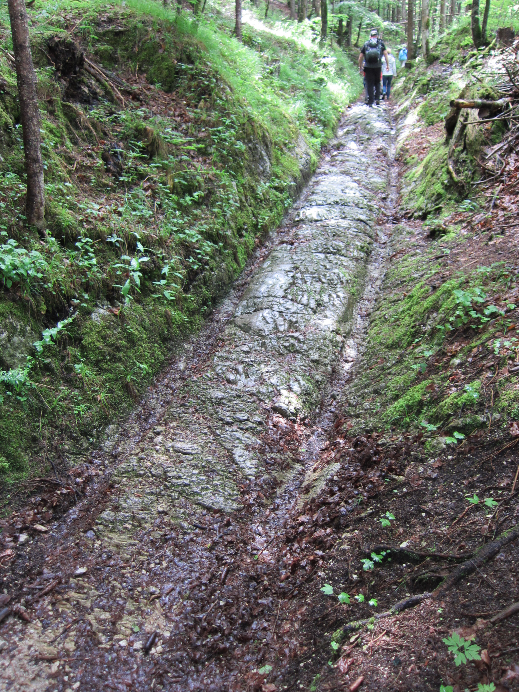 Reste der Römerstraße Via Raetia in Klais